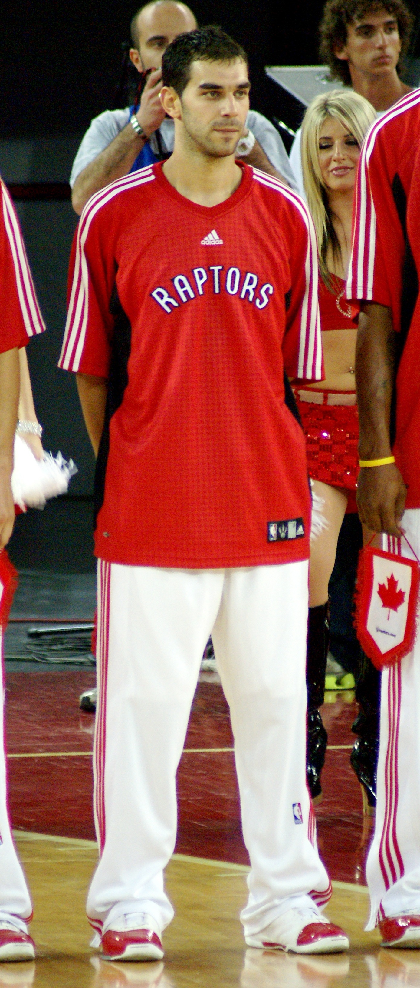 José Calderón